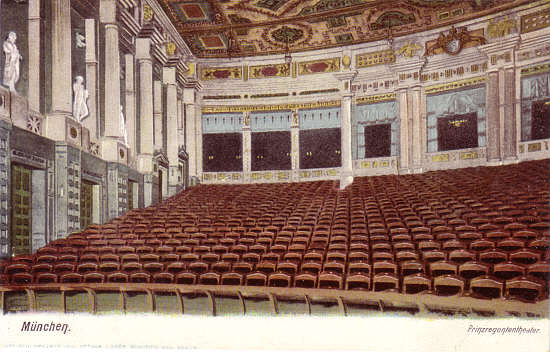 München, Prinzregententheater, Inneres; Zuschauerraum; Postkarte